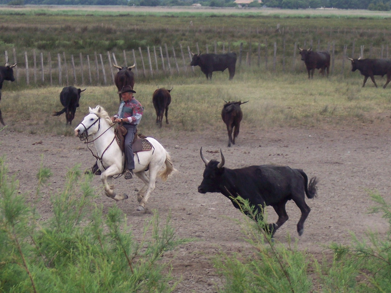 Gardian et jeune taureau en Camargue